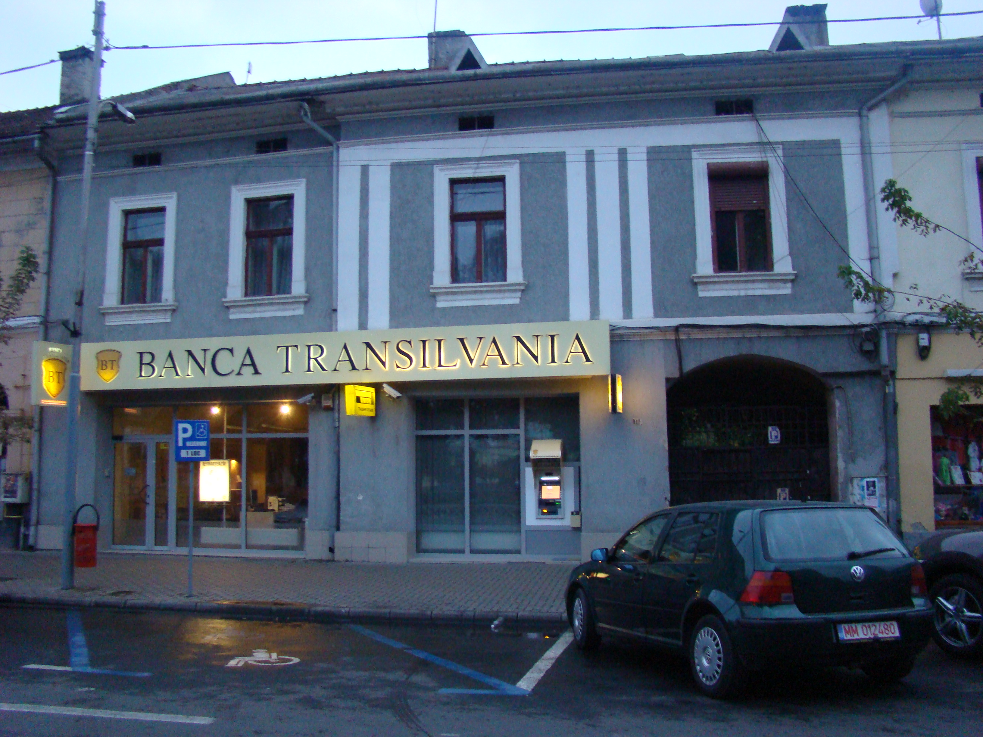 Casa Kiszelnik, municipiul Sighetu Marmației, Piața Libertății 10